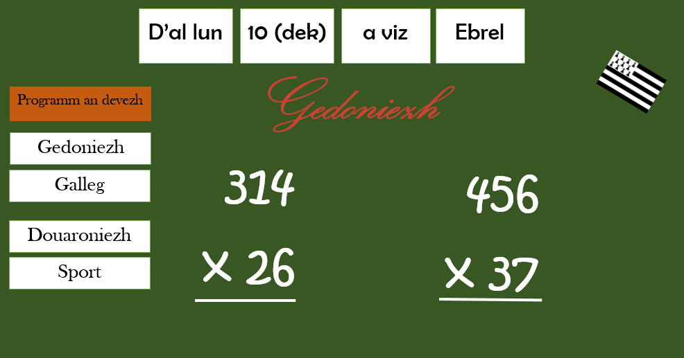 Date et emploi du temps en langue bretonne